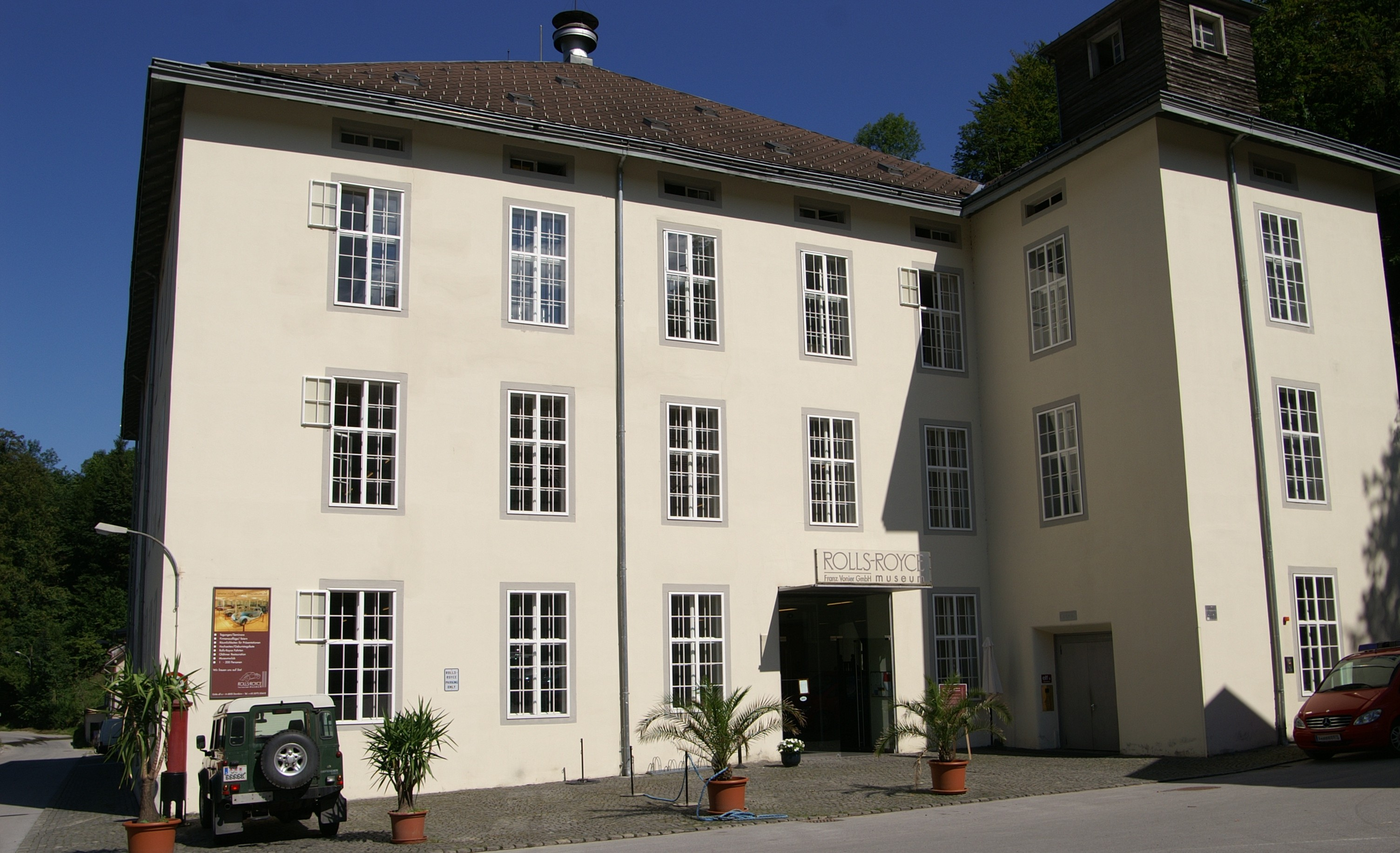 Das Rolls-Royce-Museum im Gütle, Dornbirn, Vorarlberg; ehemals ein Teil der Textilfabrik F.M.Hämmerle.